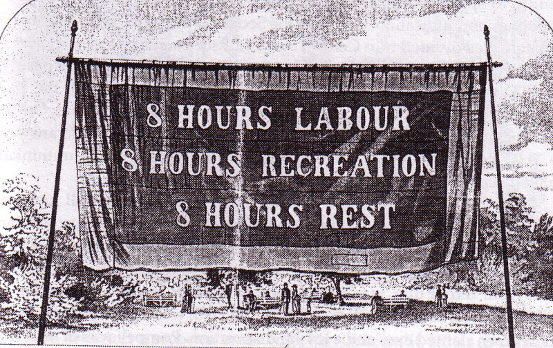 Eight Hour Day Banner, Melbourne, 1856